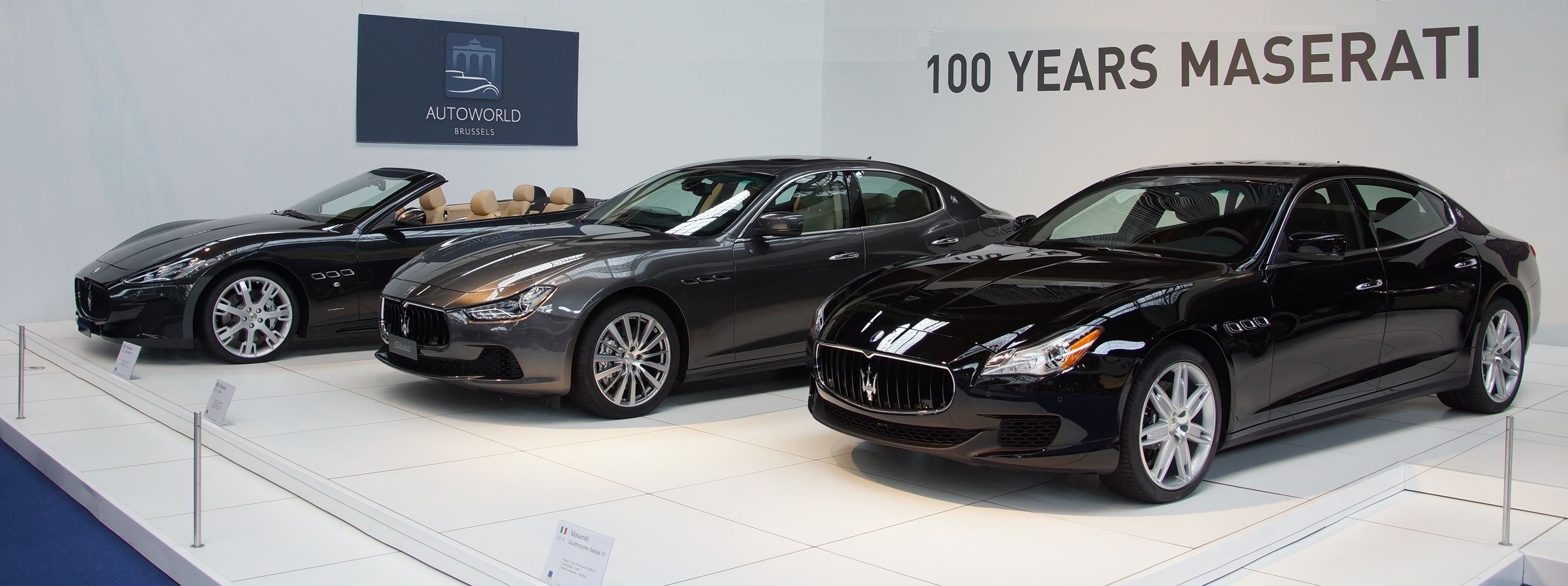 100 Years Maserati at Autoworld Brussels: From left: Maserati Grancabrio S, Maserati Ghibli III and Maserati Quattroporte Series VI